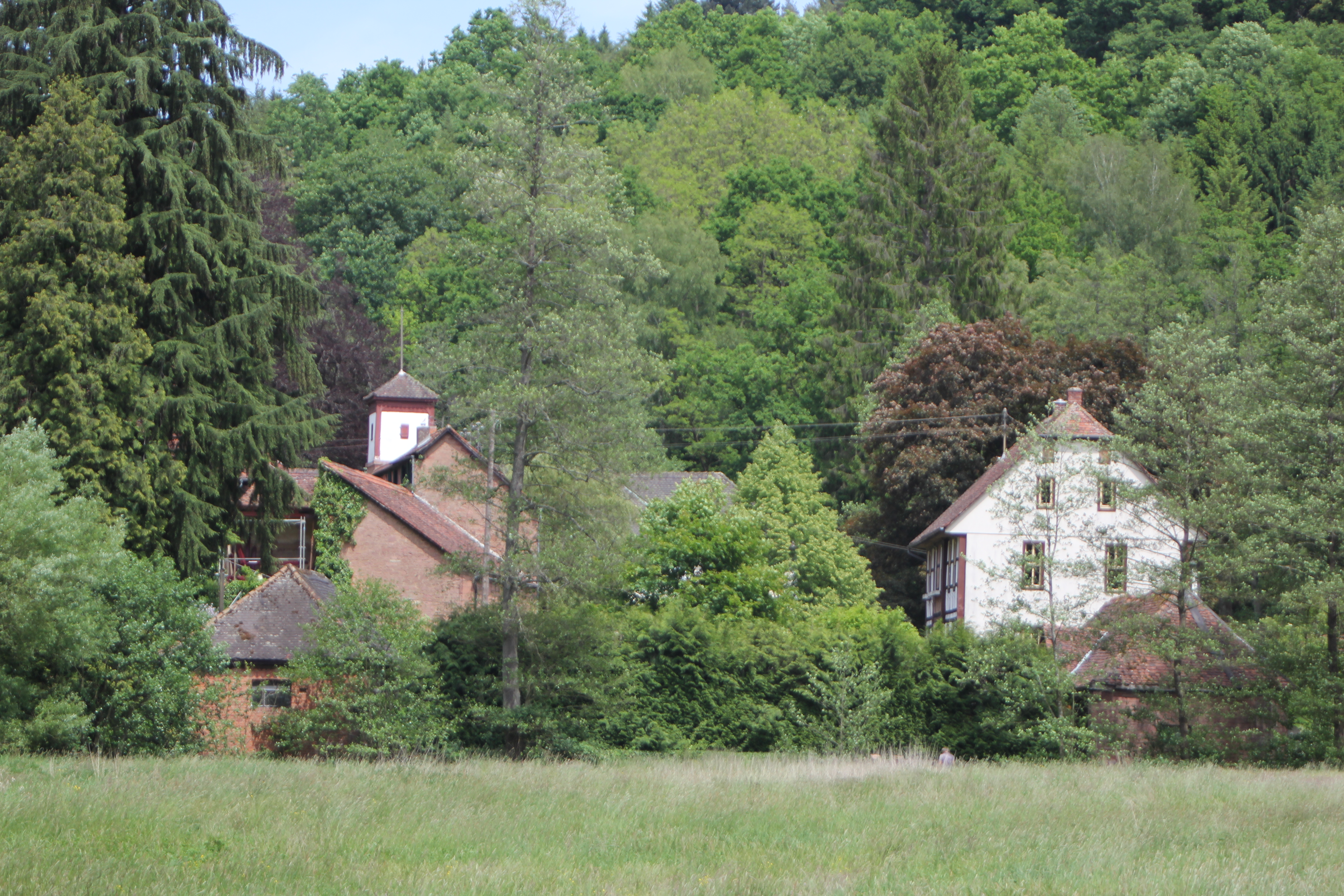 weitläufige Gebäudegruppe um die 1702 und 1774 bez. Ruine des Hauptgebäudes, meist Fachwerkhäuser der Zeit um 1805/10 (Schulhaus, Hammerhaus, Verwalterhaus, Nebengebäude)This is a photograph of an architectural monument.